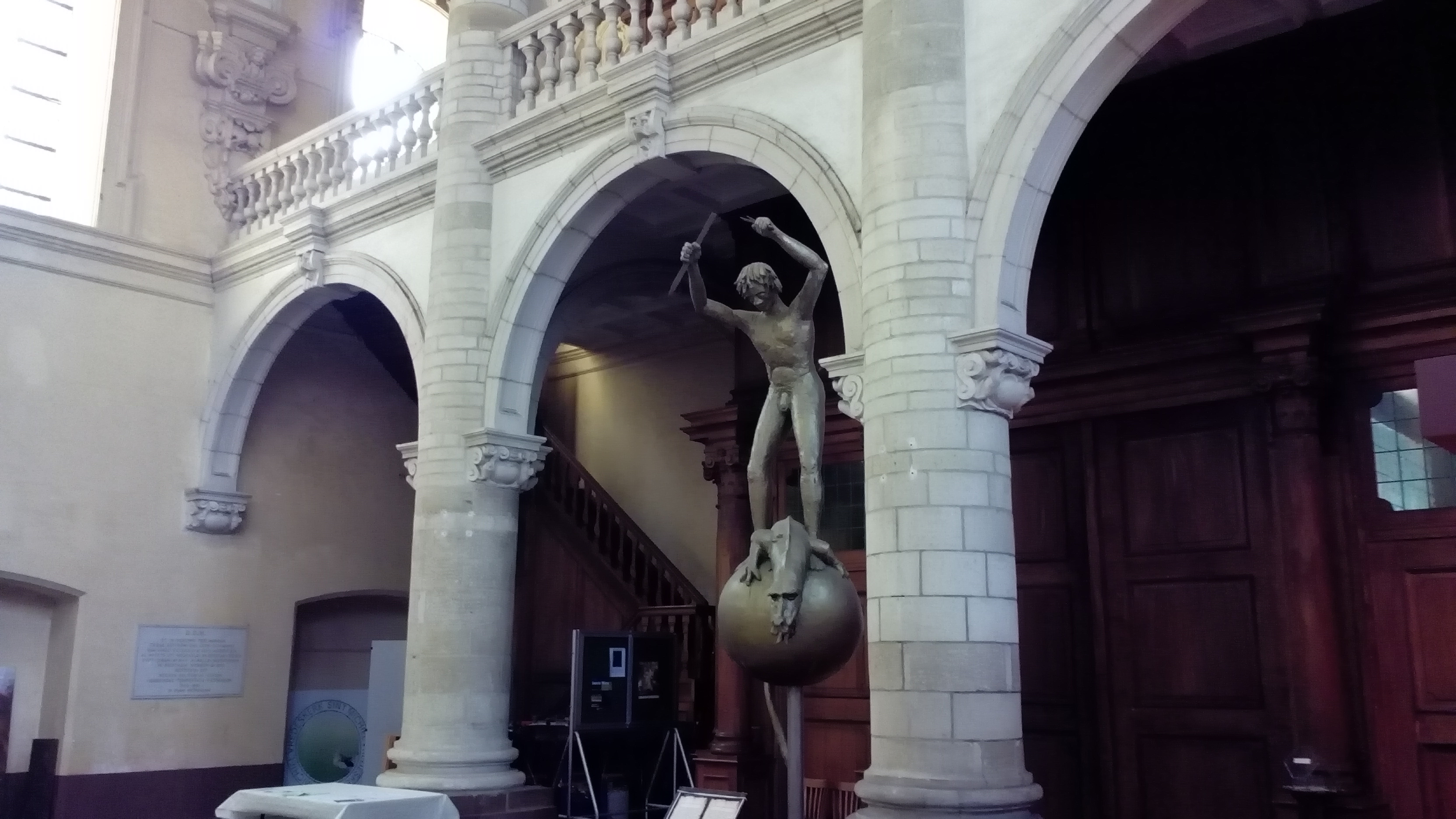 Sint-Michielskerk Leuven Ingang gedenkplaat oorlog en Sint-Michiel door Ad Wouters